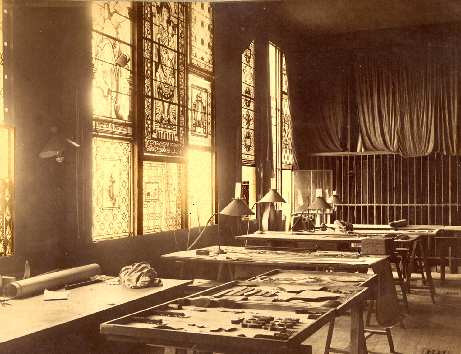 Les ateliers de Lucien Bégule à Choulans (Lyon)